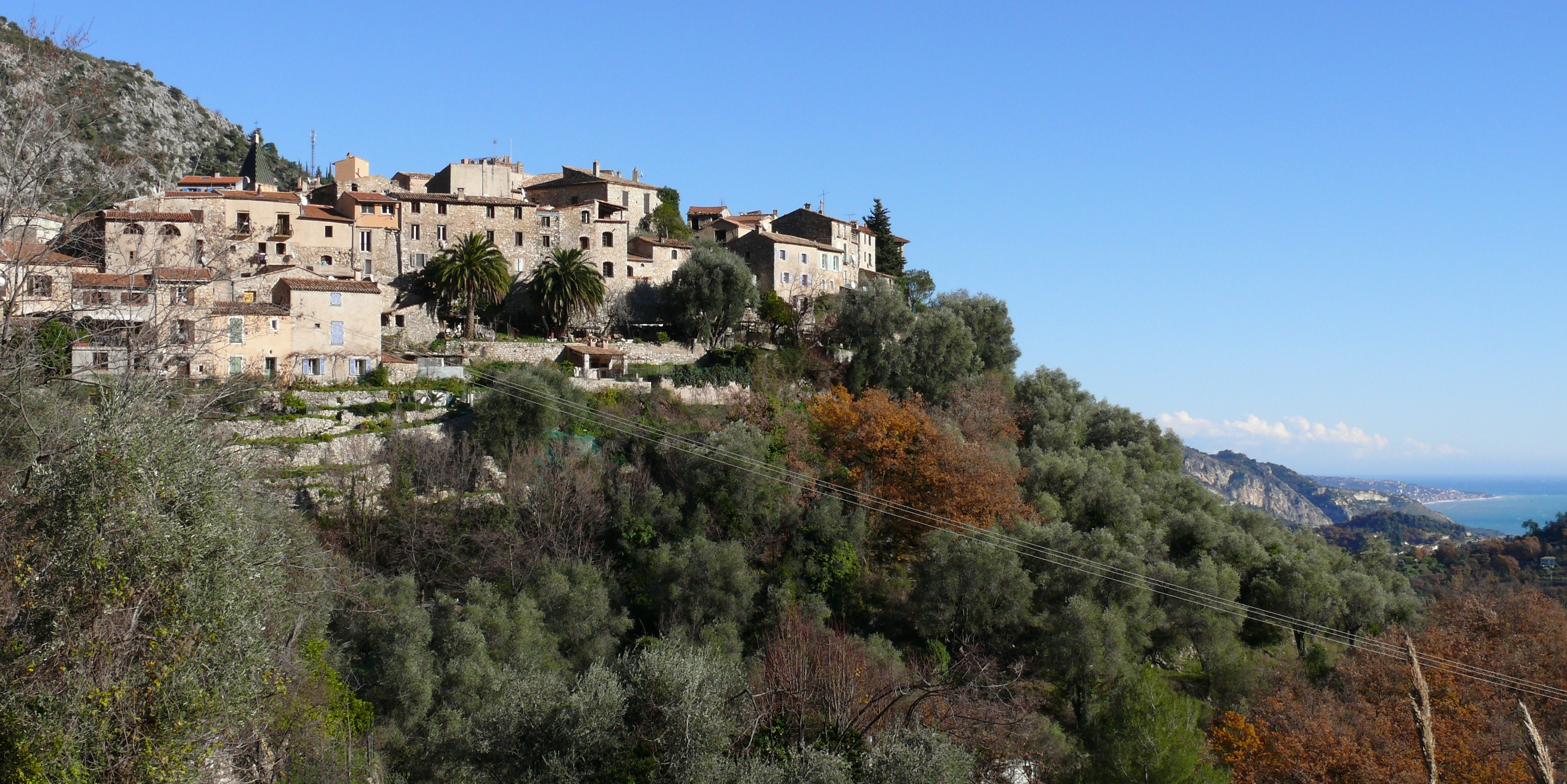 Gorbio - Vue d'ensemble